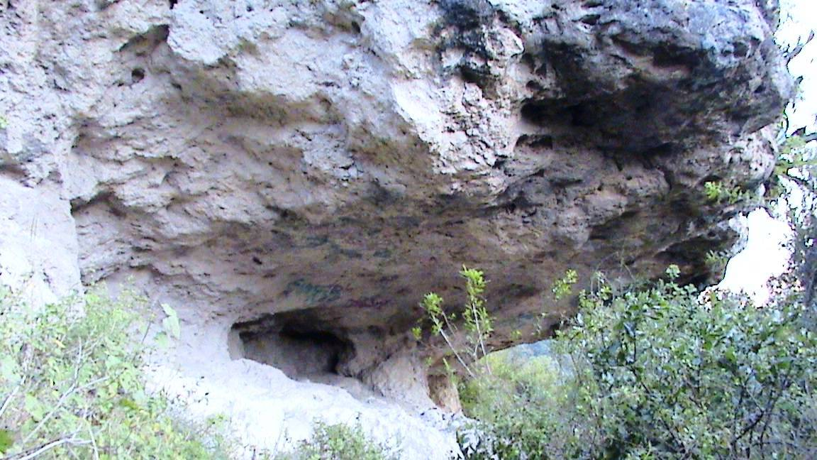 Lugar donde, según la tradición, estuvo ubicada la Ermita de la Virgen.